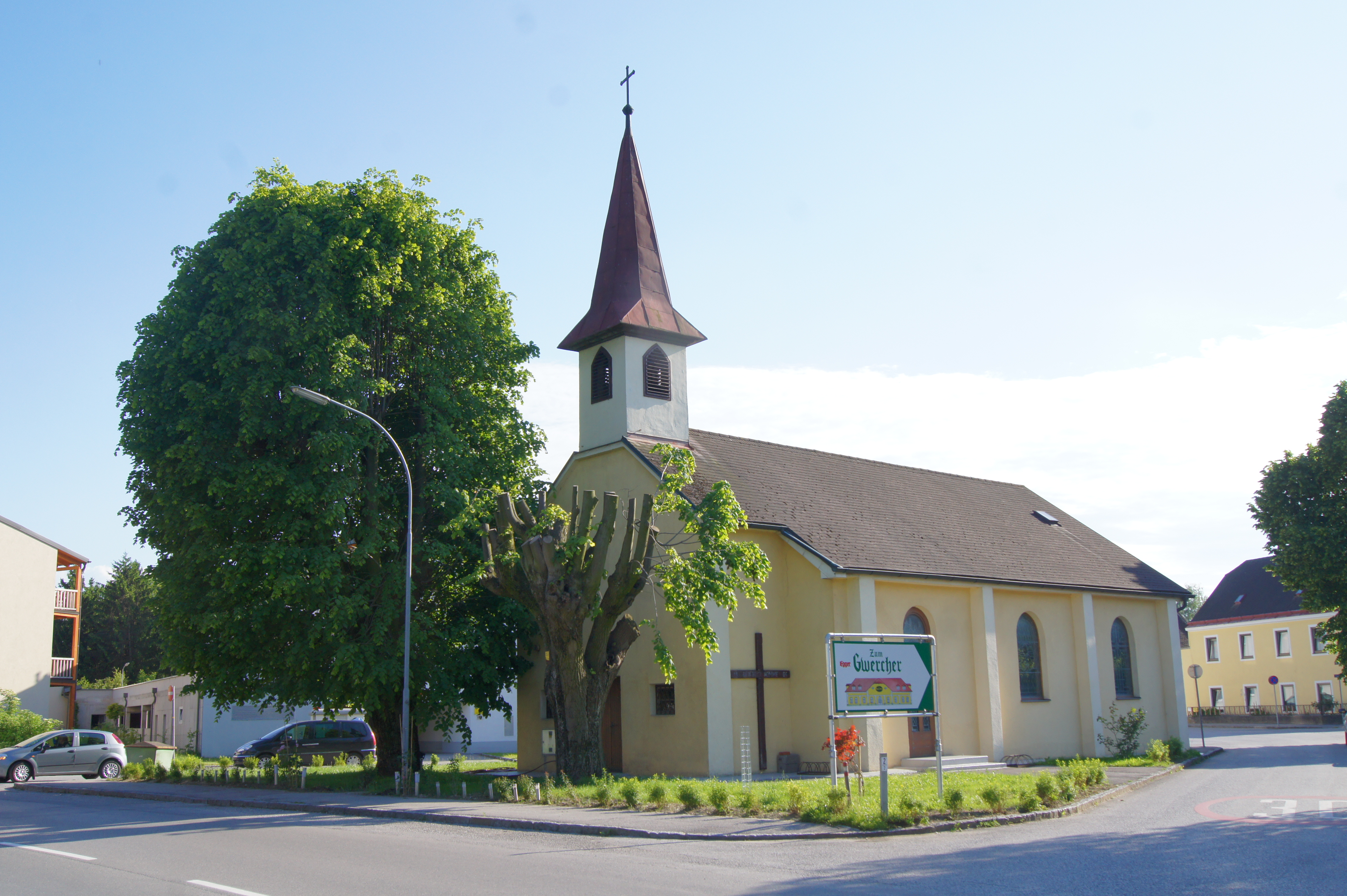 2 holländische Linden This media shows the natural monument in Lower Austria with the ID P-030.